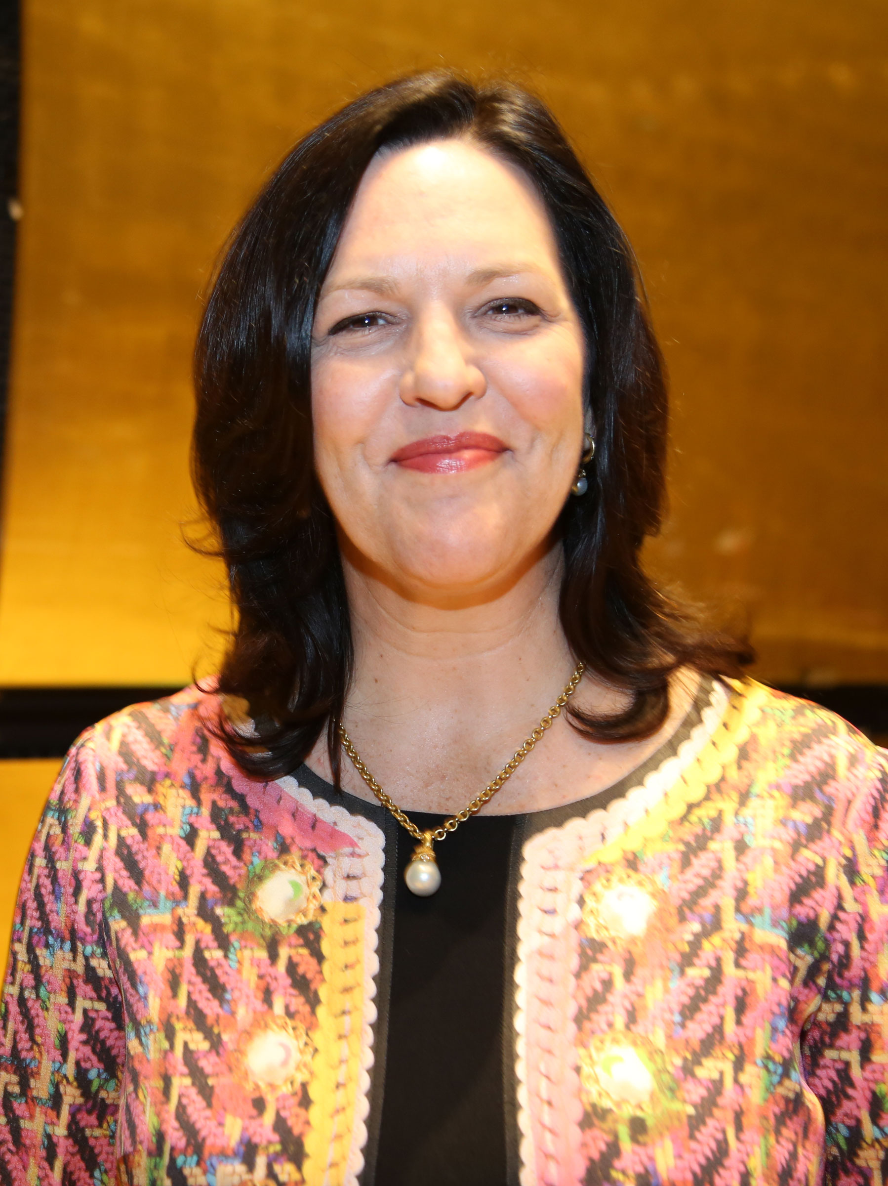 Kammersängerin Adrianne Pieczonka, kanadische Opernsängerin (Sopran)